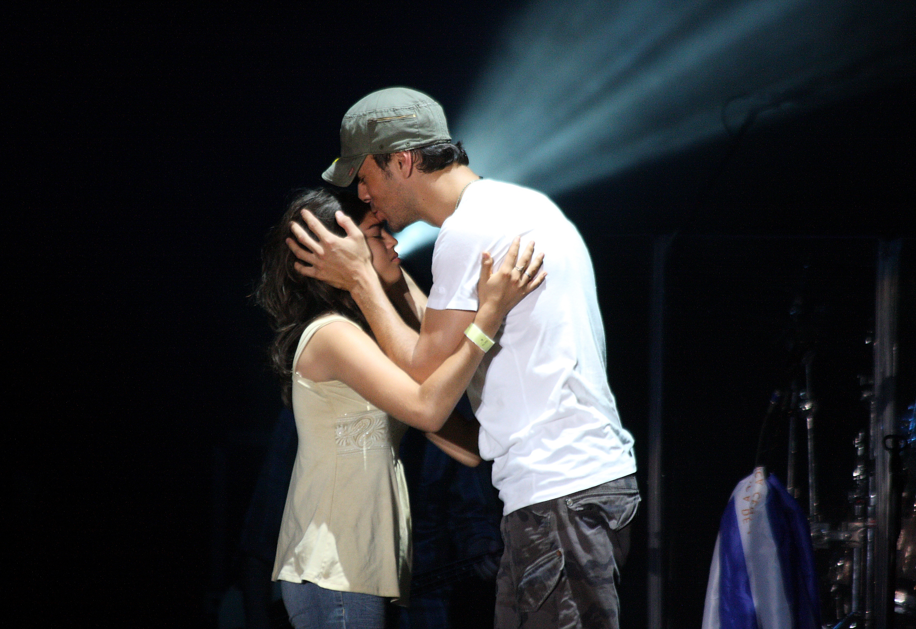 Enrique Iglesias, Concierto en Managua.